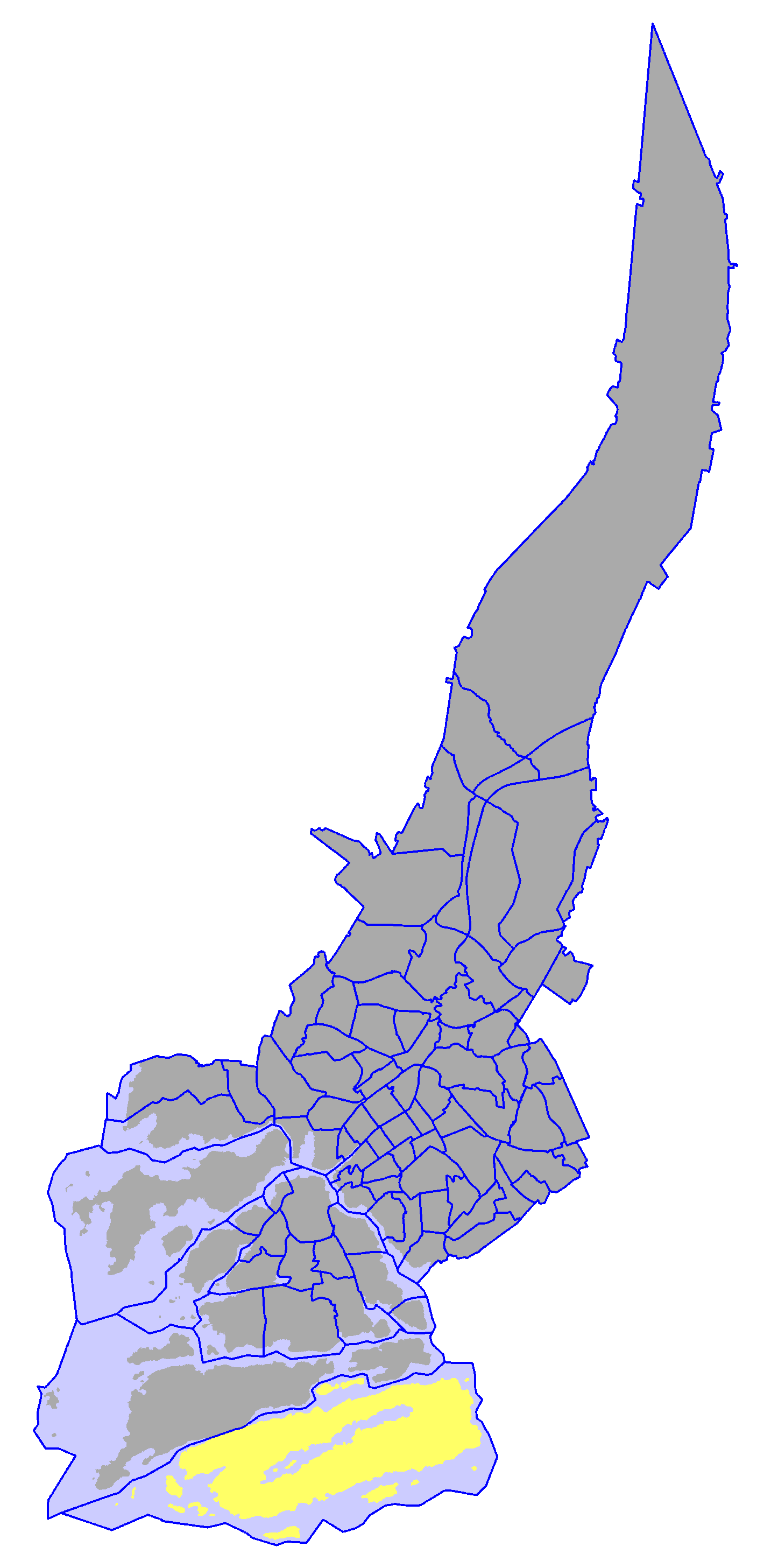 District of Kakskerta, in Turku